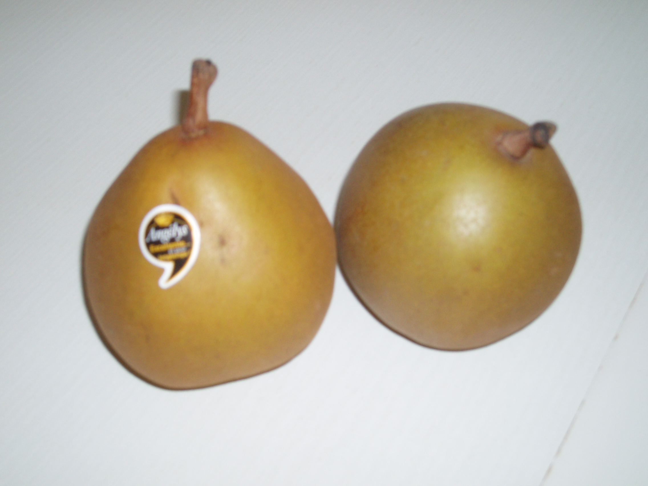 Angélys peren